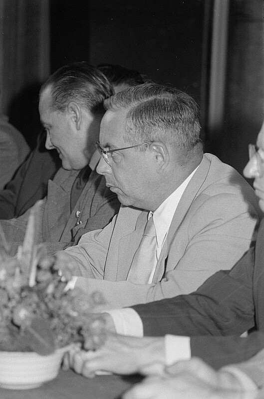 Original image description from the Deutsche Fotothek Portrait Lothar Bolz' auf dem Podium der Deutschen Bautagung im Weißen Saal